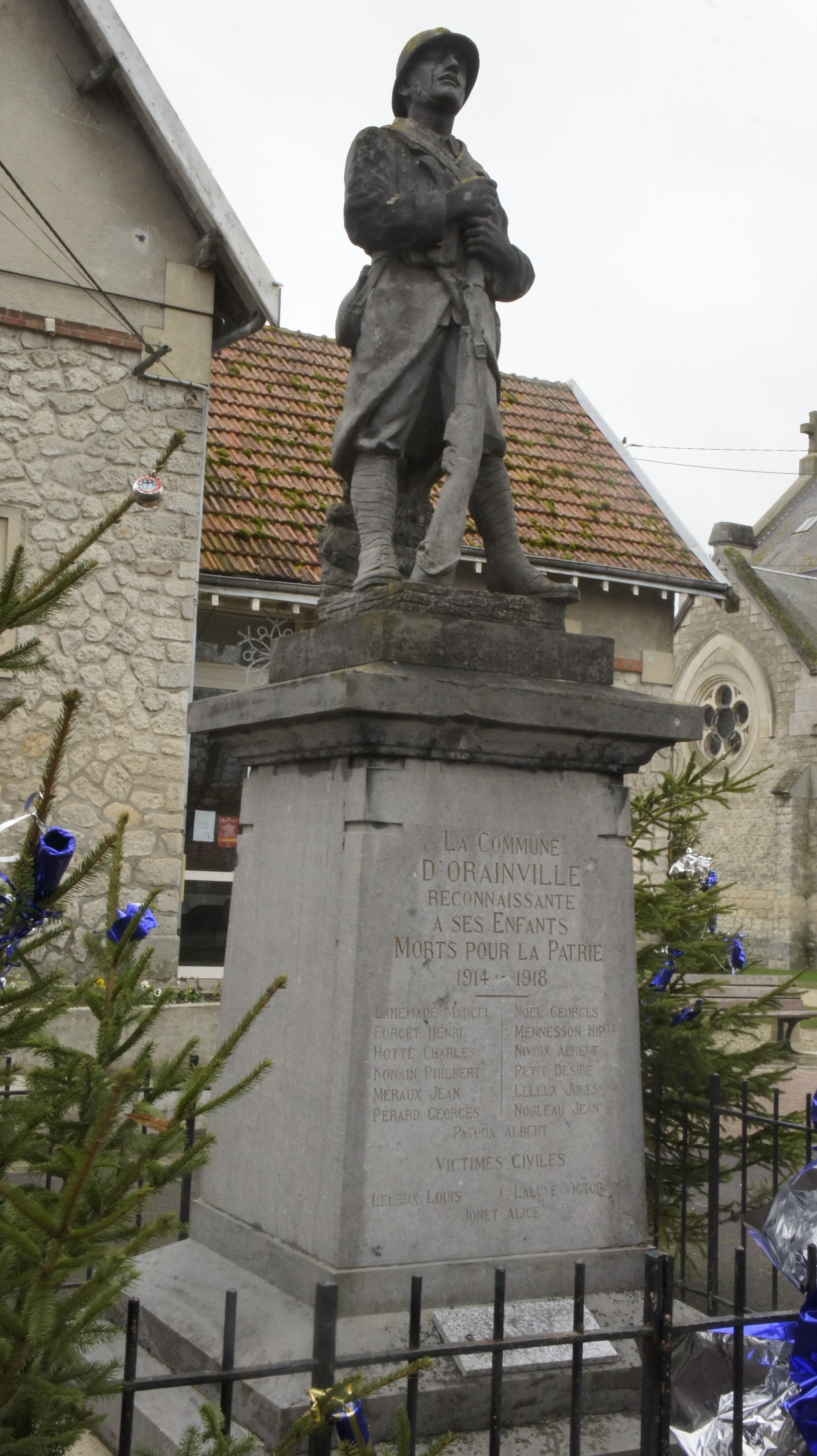 vue de Orainville.